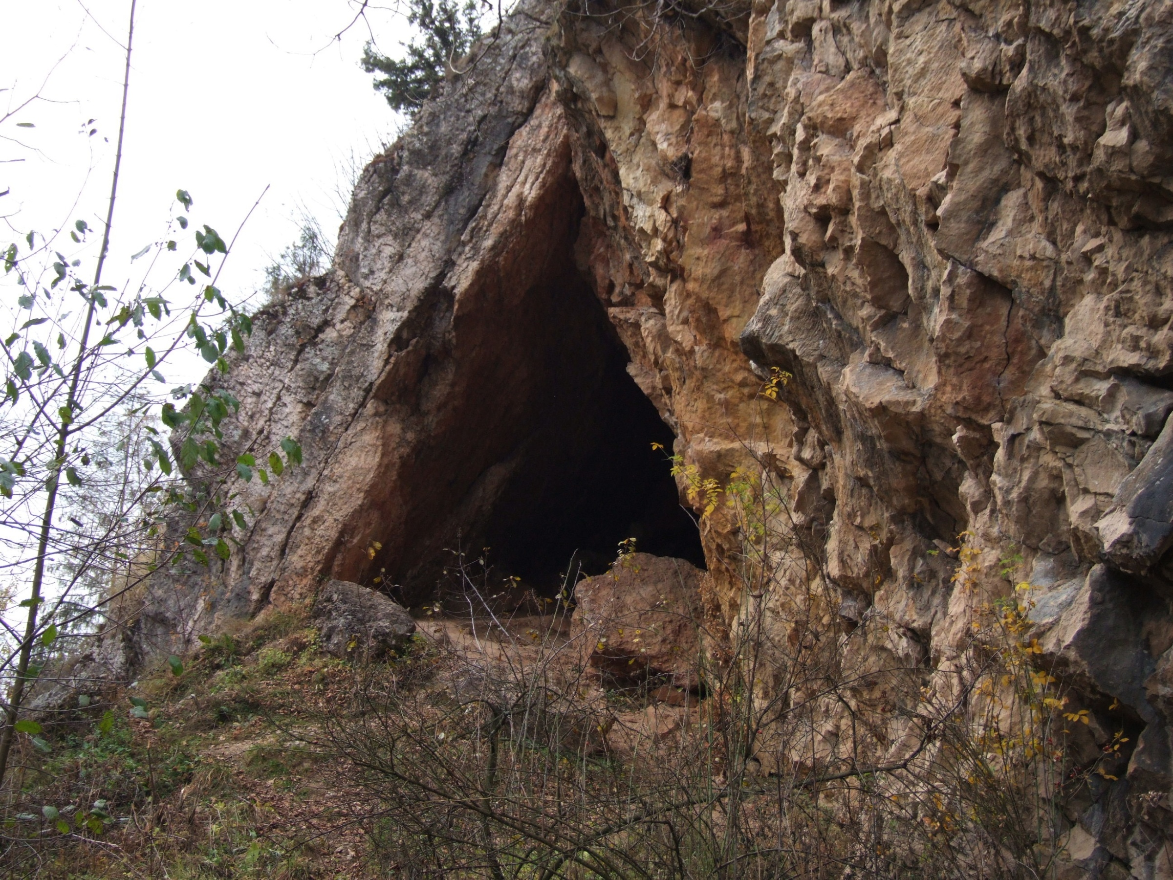 Wyrobisko kamienia w Obłazowej